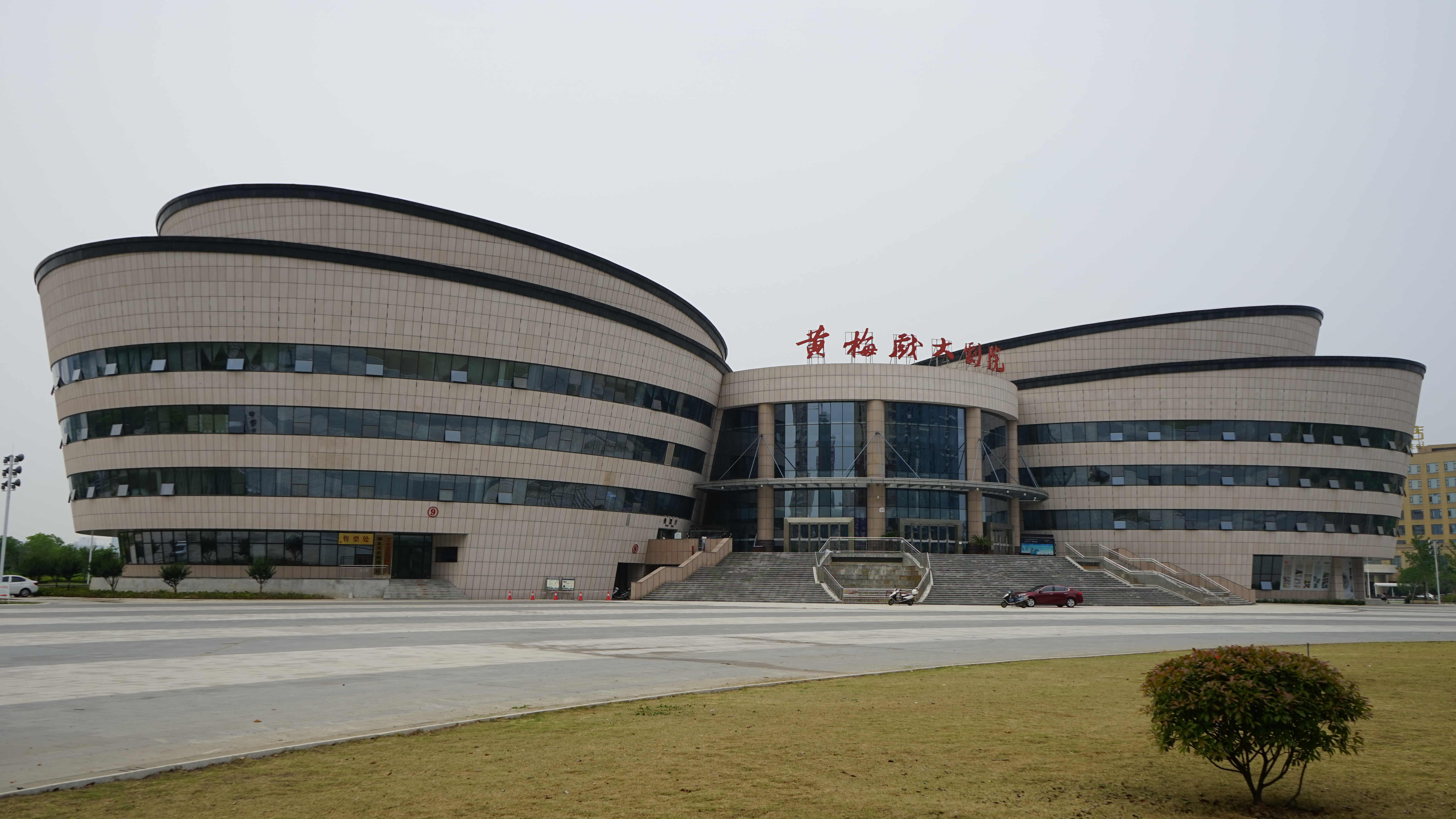 中文（中国大陆）: 黄梅戏大剧院，位于遗爱湖畔